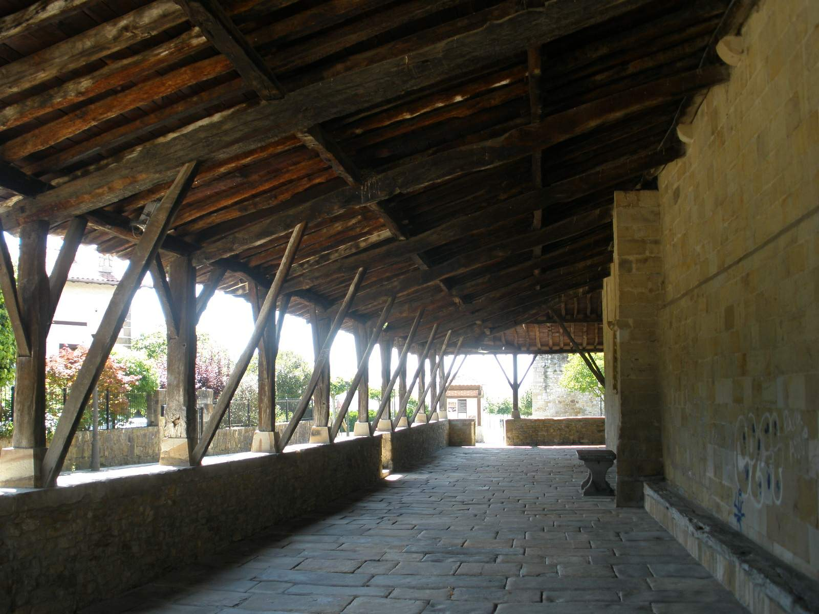 Iglesia de San Martín de Arteaga, Zamudio (Bizkaia)